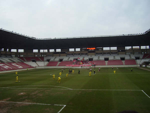 Nuevo Estadio Las Gaunas por dentro, donde juega el Club Deportivo Logroñés.